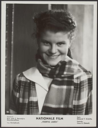 Martha Posno.